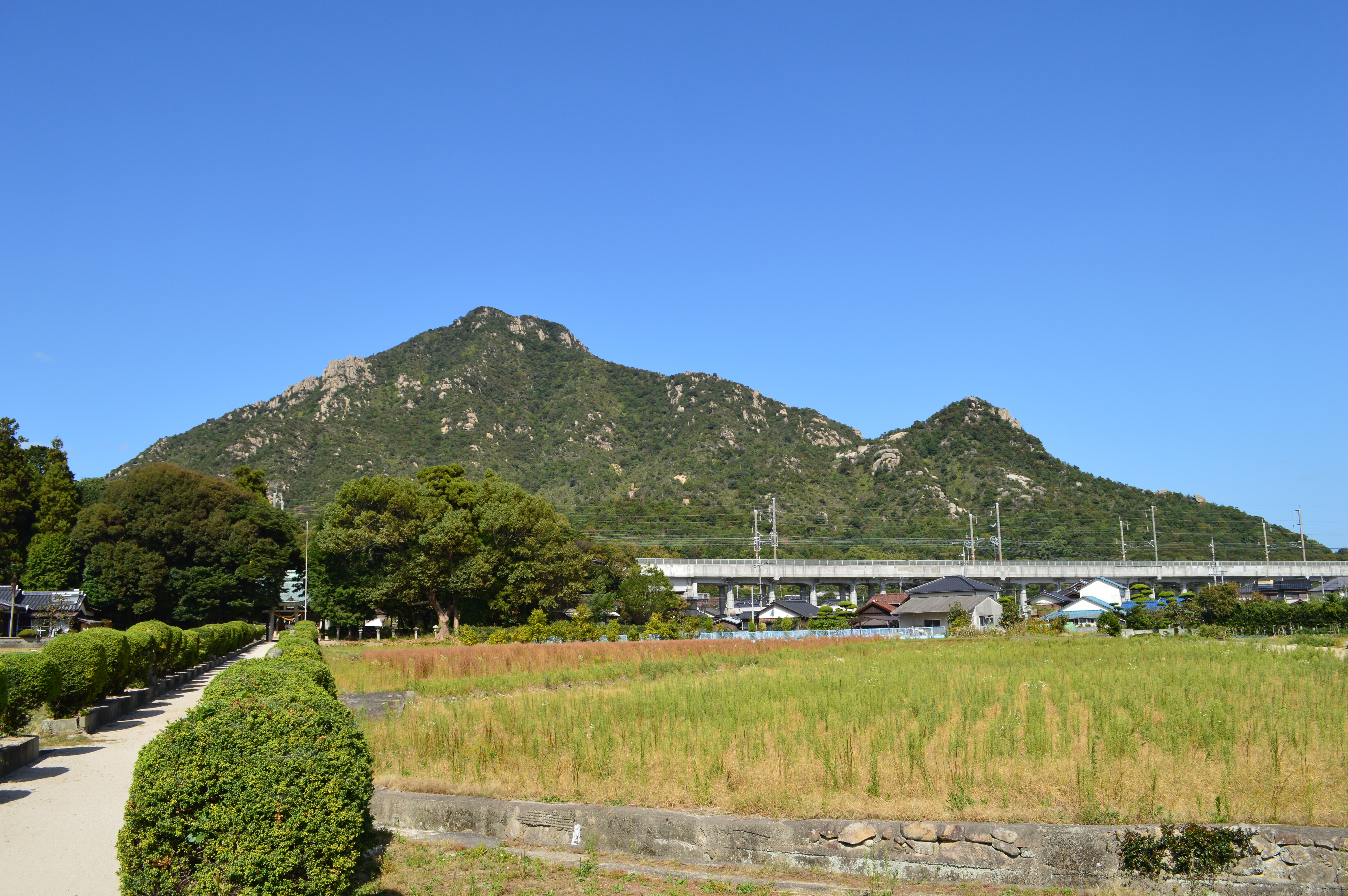 劔神社から望む右田ヶ岳